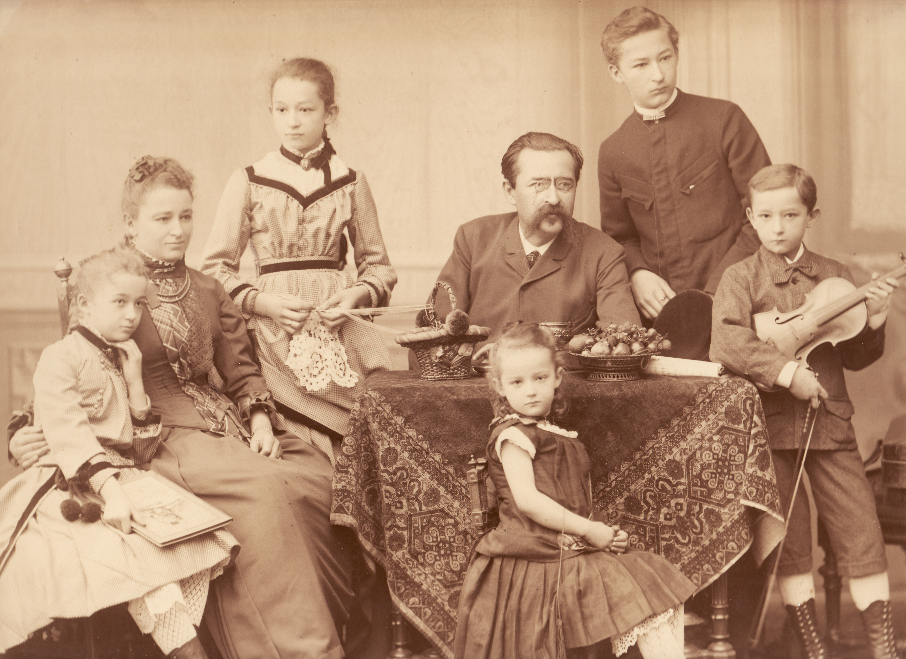 Richard Cramer (Pseudonym Rudolf Lavant) mit Familie